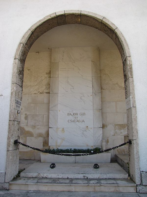 Le tombeau de la famille Bajor au Budapest dans la cimetiere Farkasrét.